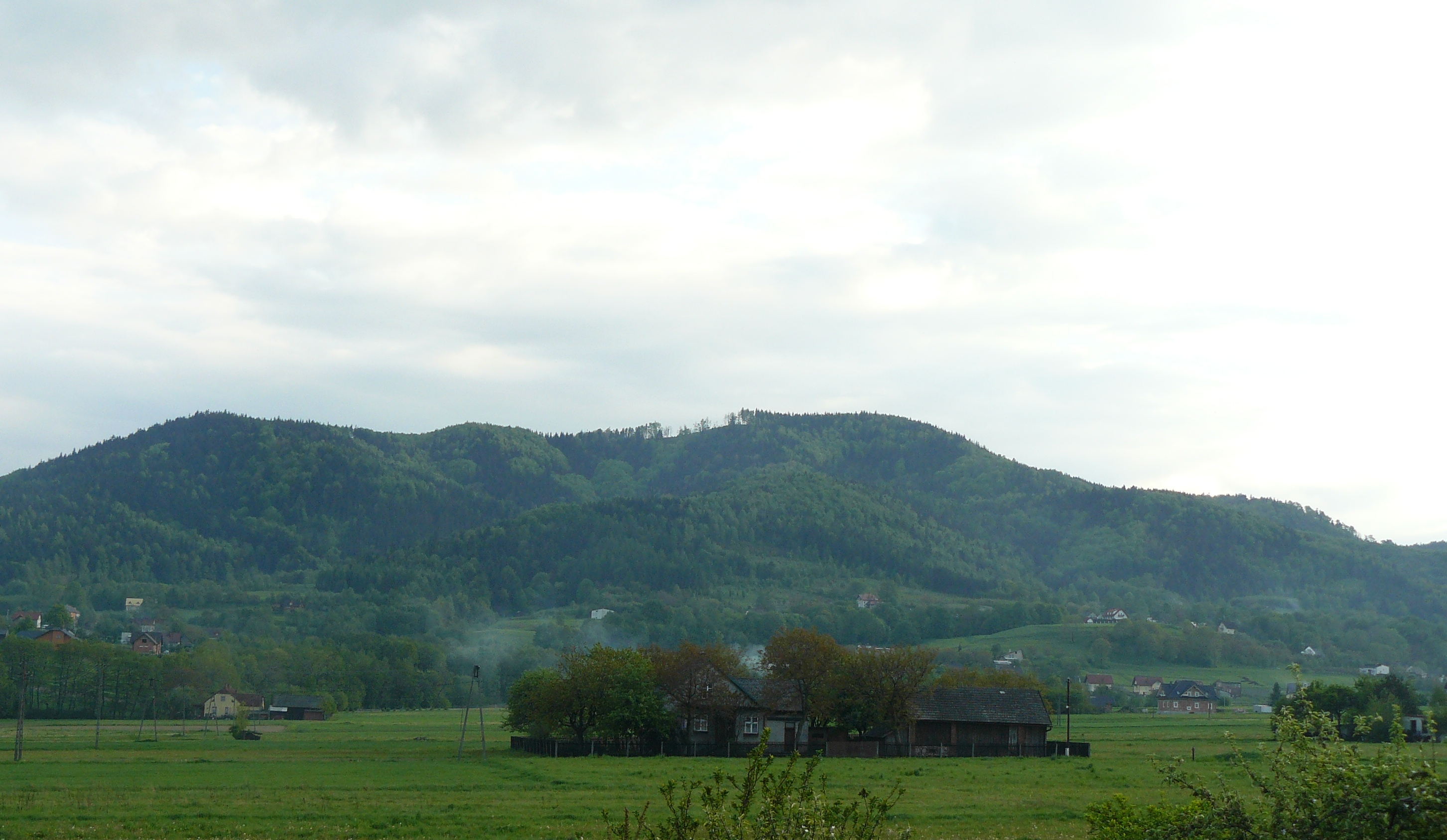 roczyny-zlota-gorka